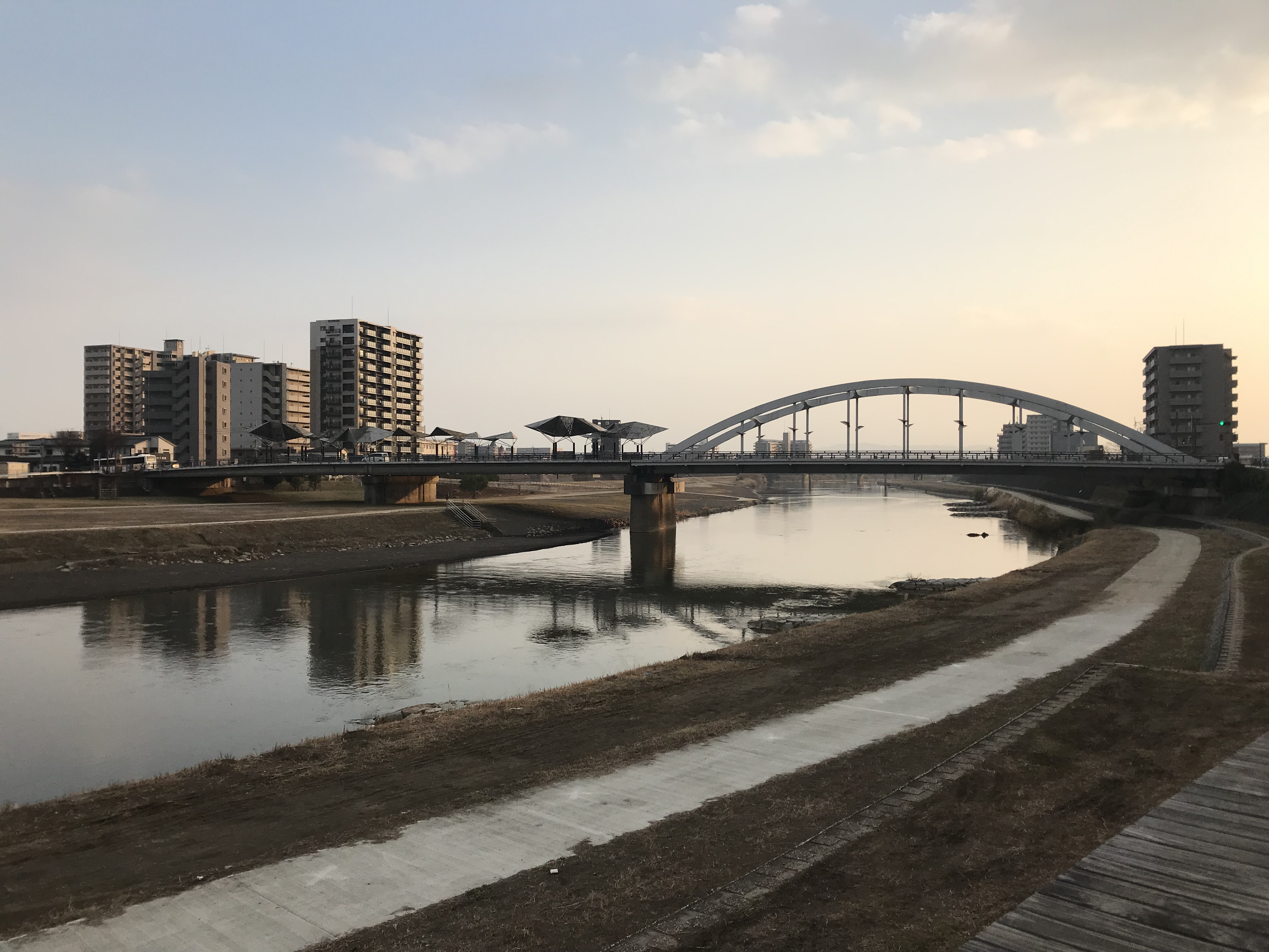 白川に架かる白川橋